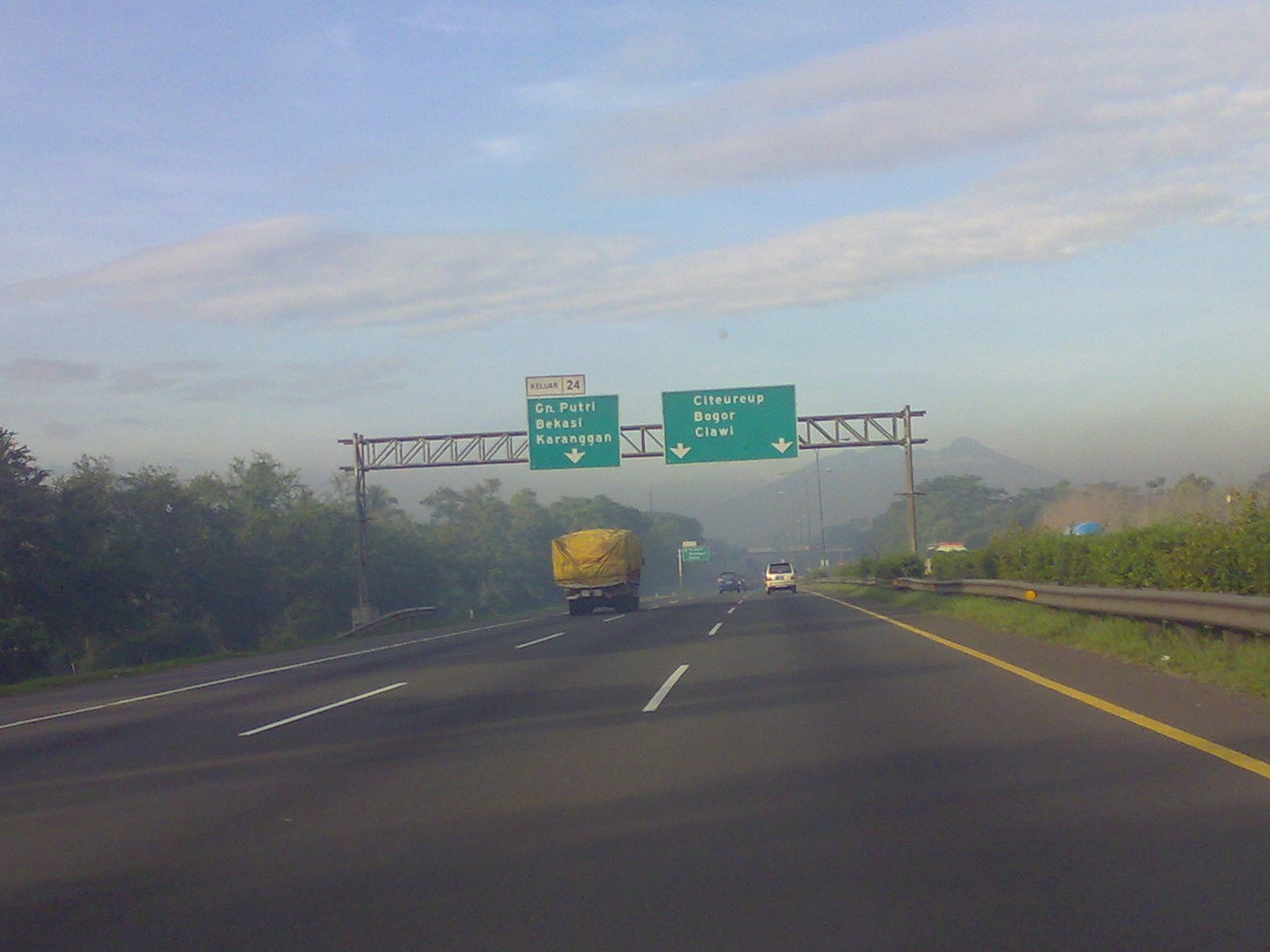 L'autoroute Jagorawi